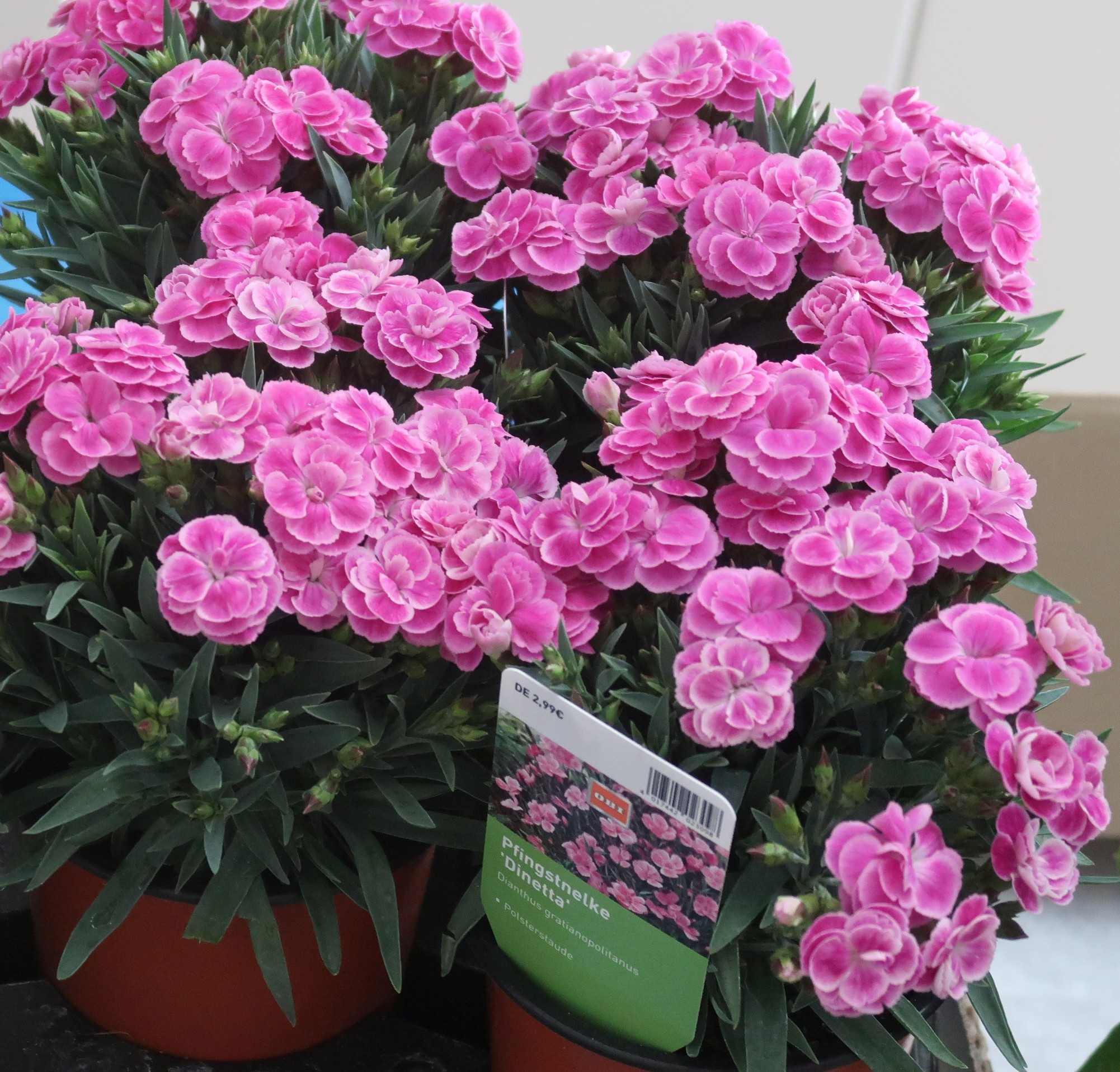 Pfingstnelke Dianthus gratianopolitanus, Zuchtsorte "Dinetta", Standort Wien (Österreich)